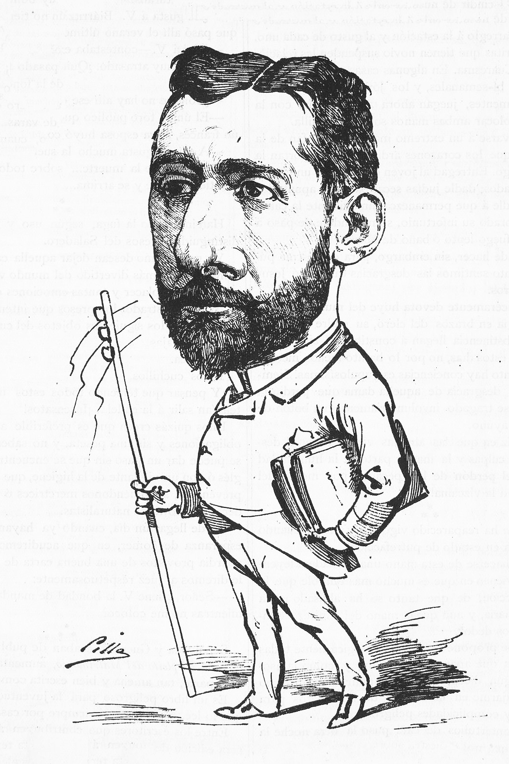 José Jackson Veyán.